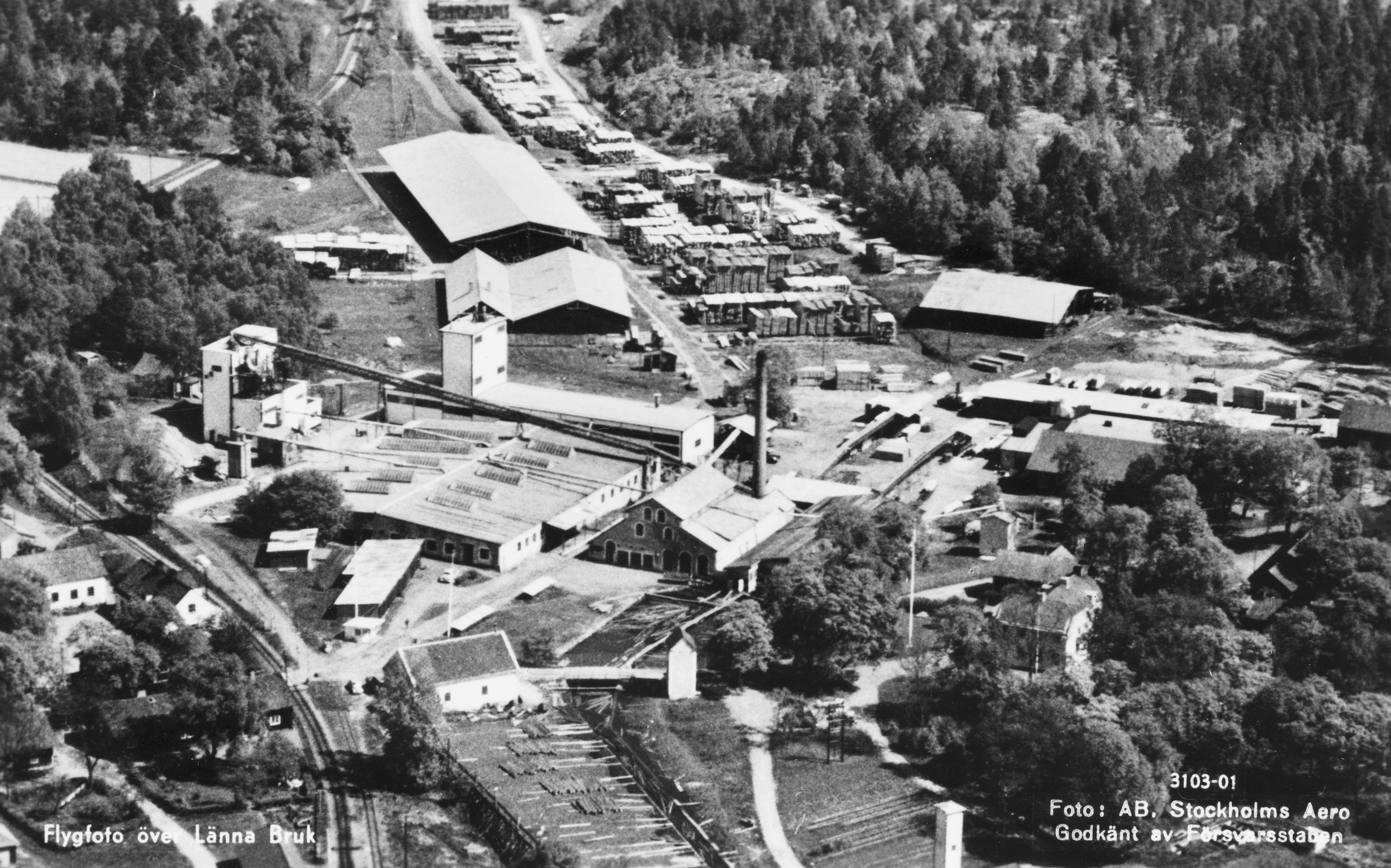 Fabriksområdet, Länna Bruk, flygfoto.